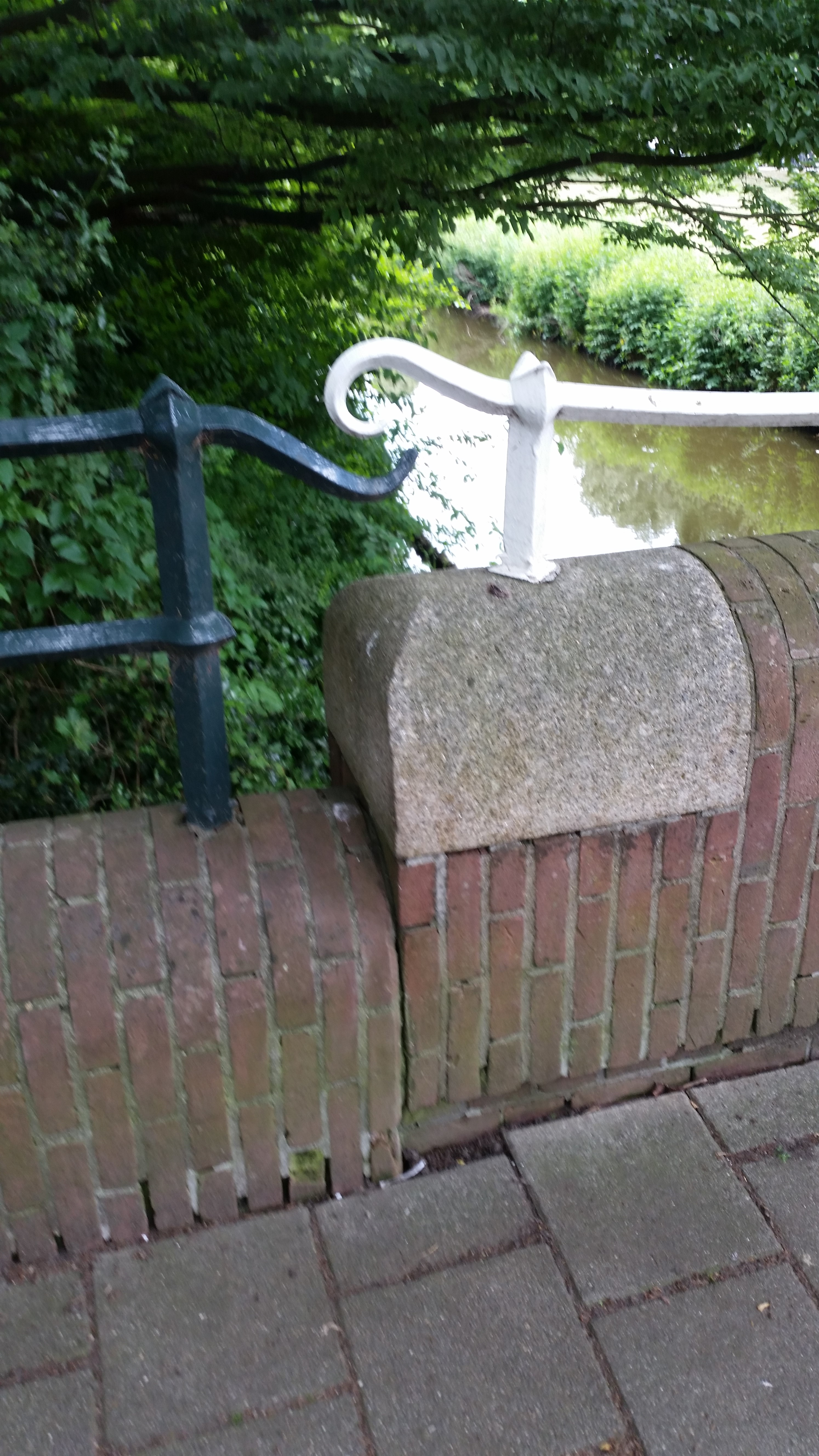 Brug 335, Jaap Kruizingabrug, Amsterdam-Watergraafsmeer, detail van overgang leuning van landhoofd naar brug